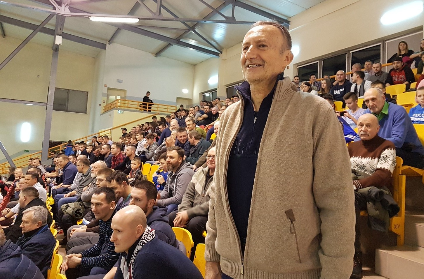 Bogdan Dębicki, były koszykarz Spójni